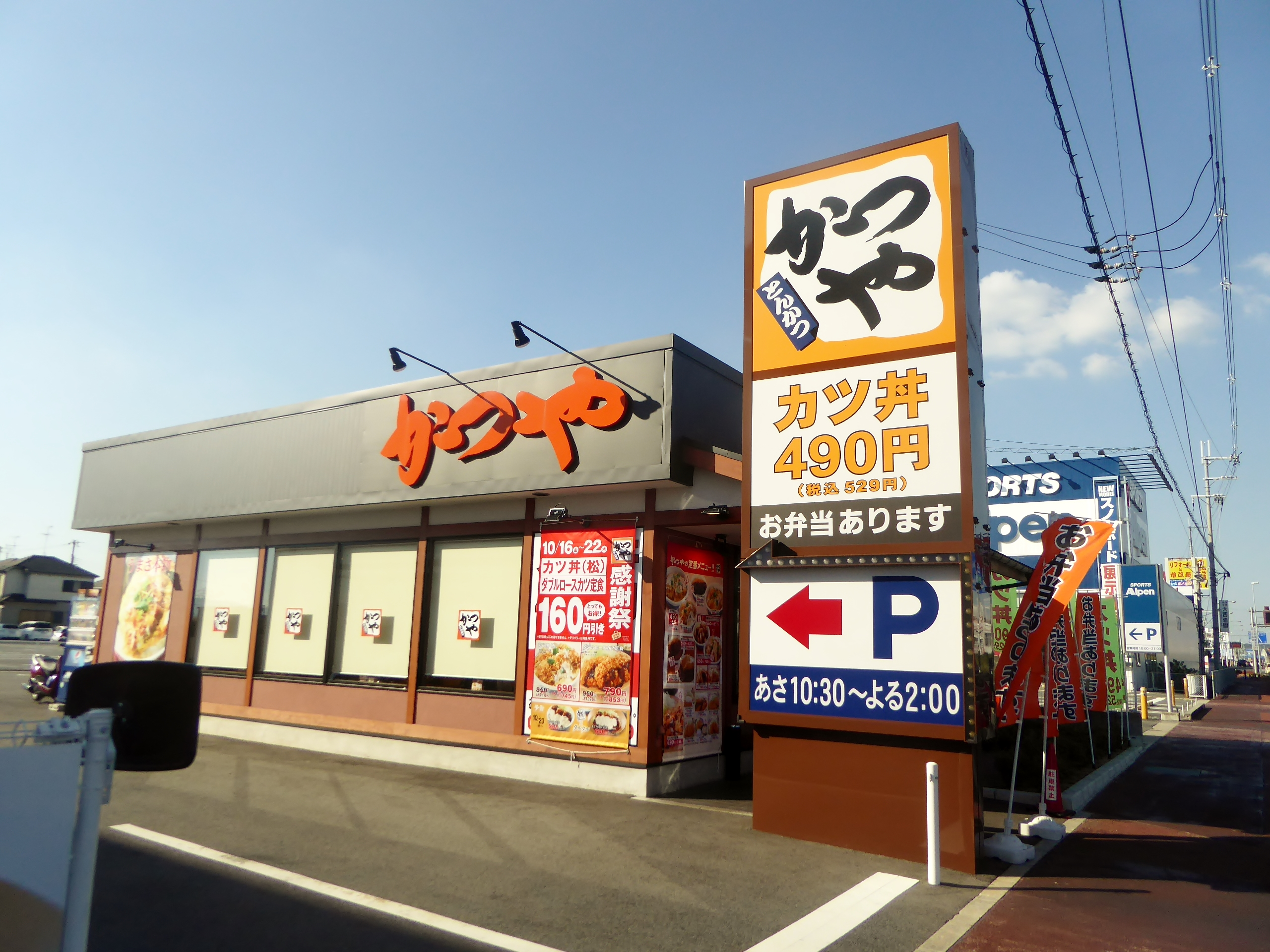 かつや奈良尼ヶ辻店を撮影。